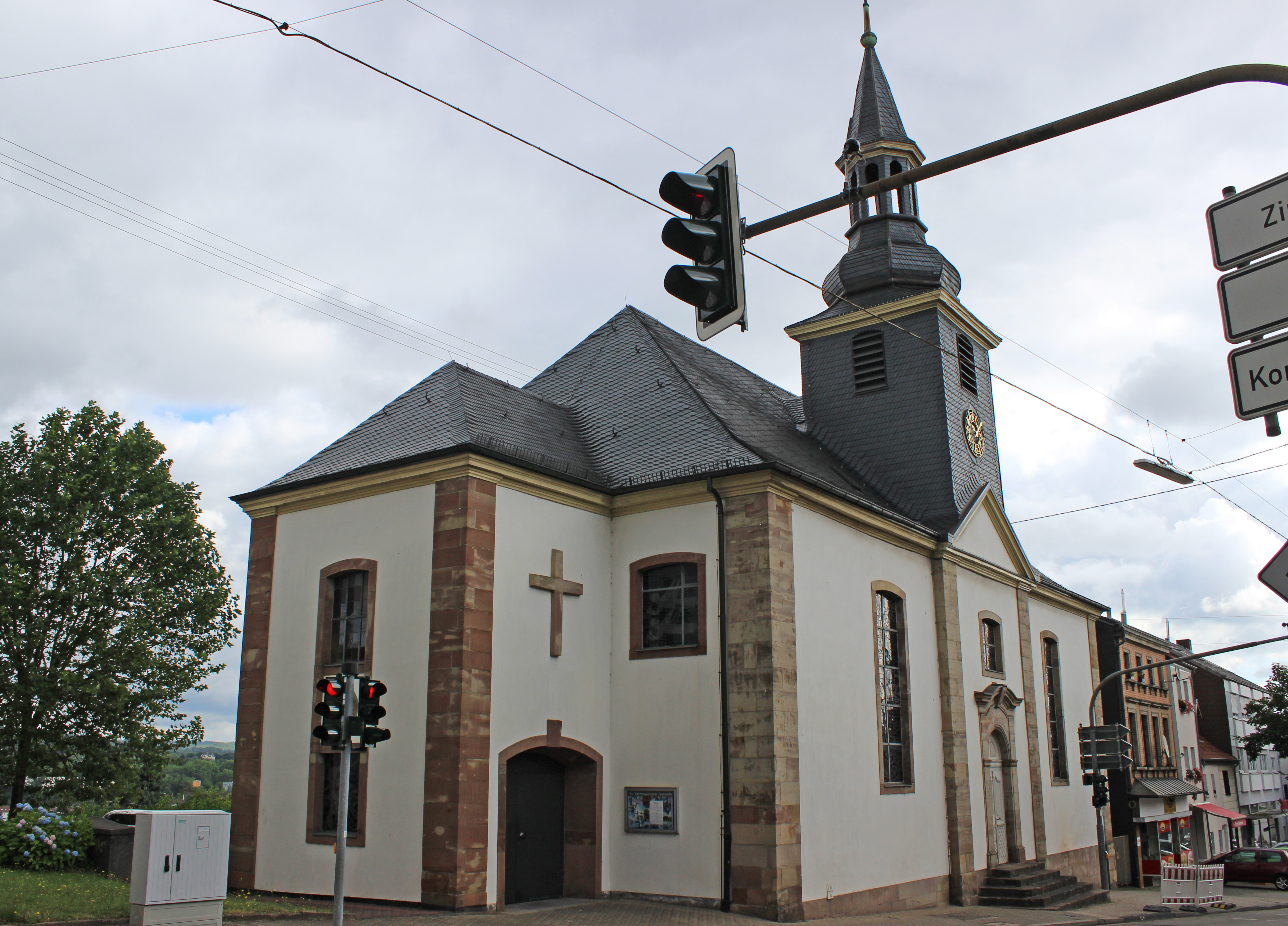 Die evangelische Kirche in Gersweiler, einem Stadtteil der saarländischen Landeshauptstadt Saarbrücken